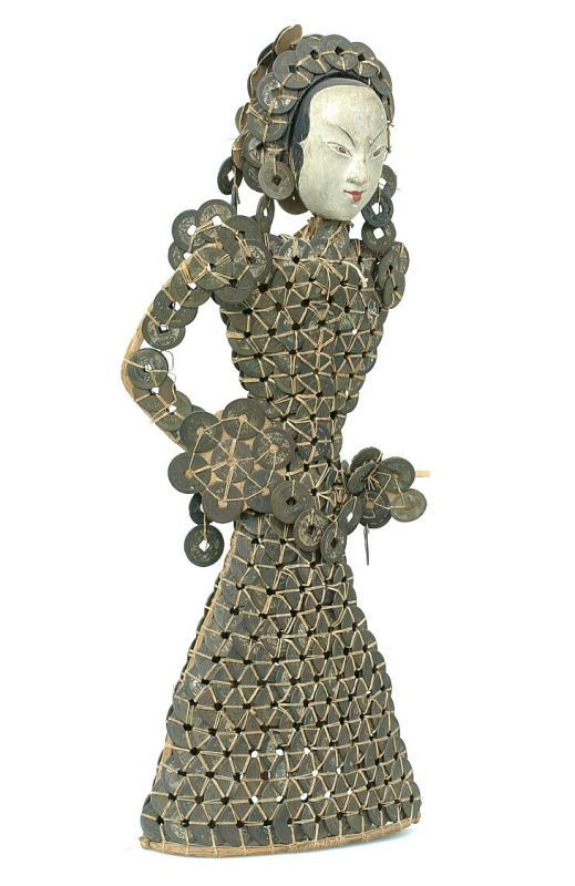 Beeld. Symbool van materiele welstand, gemaakt van Chinese munten (kepengs).. Beeld van een vrouw gemaakt van Chinese kepeng-munten Unknown language: Rabut of Rambut Sedana